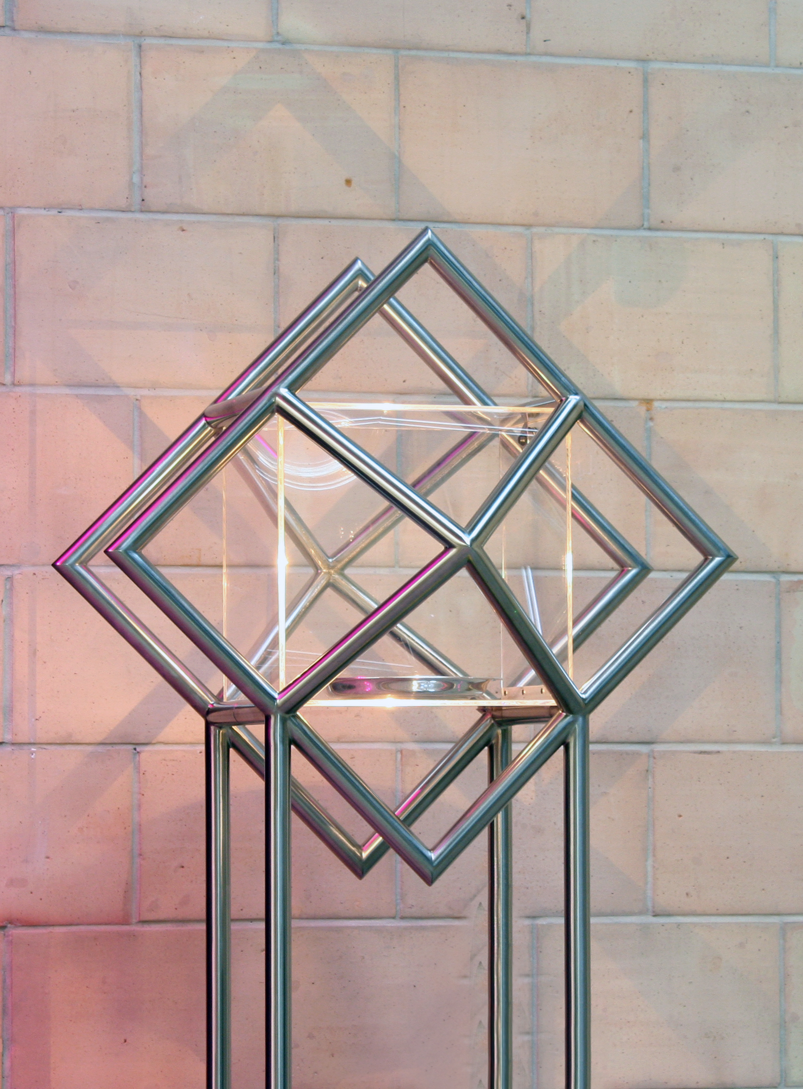 Römisch-katholische Pfarrkirche Christkönig Kloten, Tabernakel